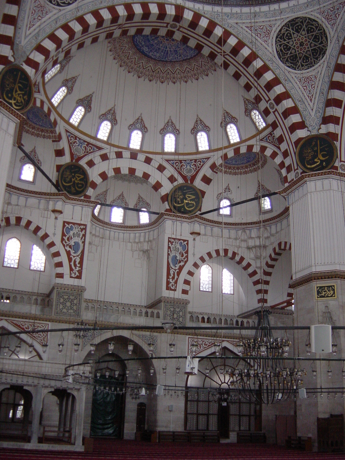 Interno della Moschea detta Sehzade camii ad Istanbul. Foto di: Giovanni Dall'Orto, 29-5-2006.